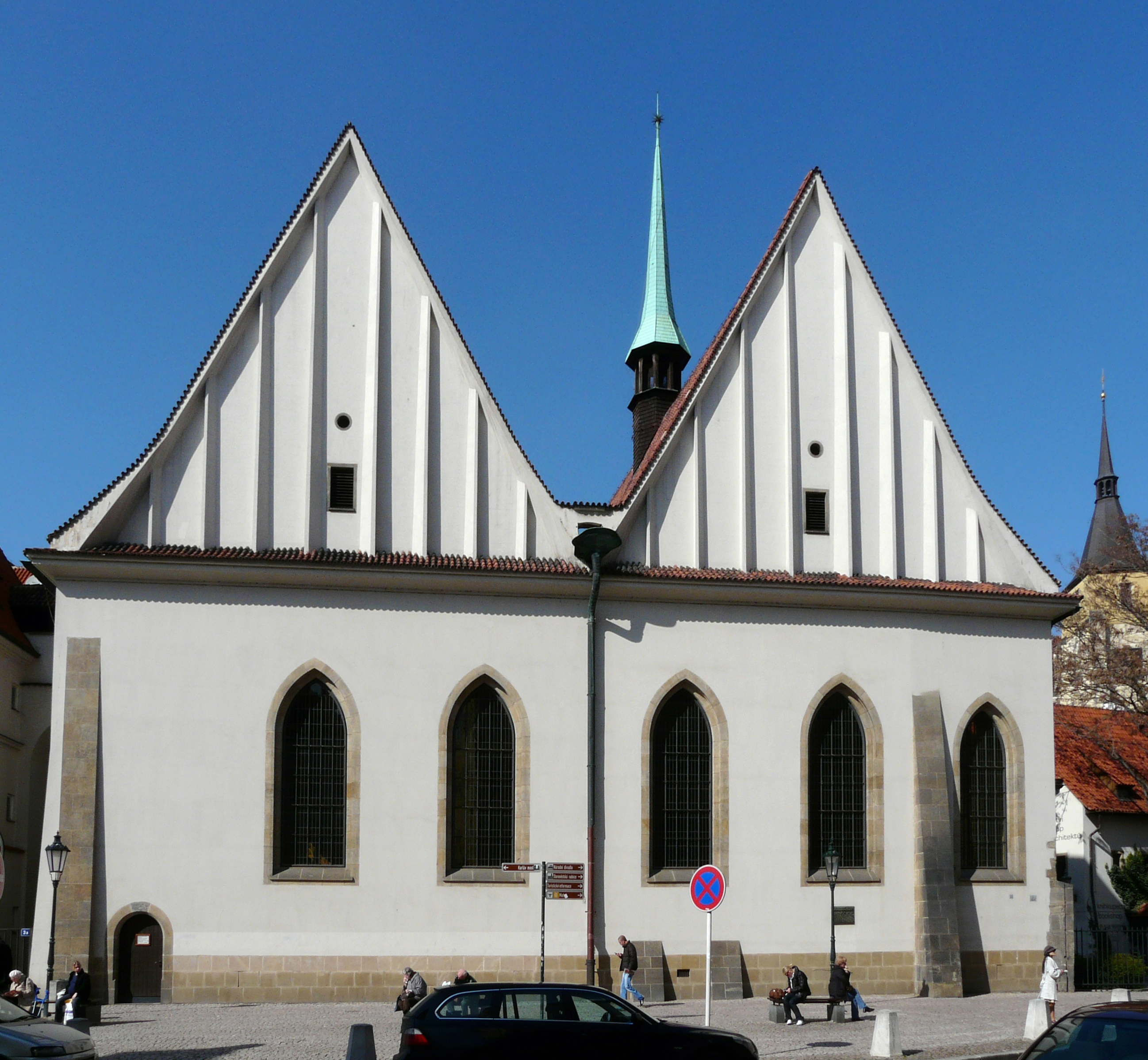 Bethlehem Chapel Prague